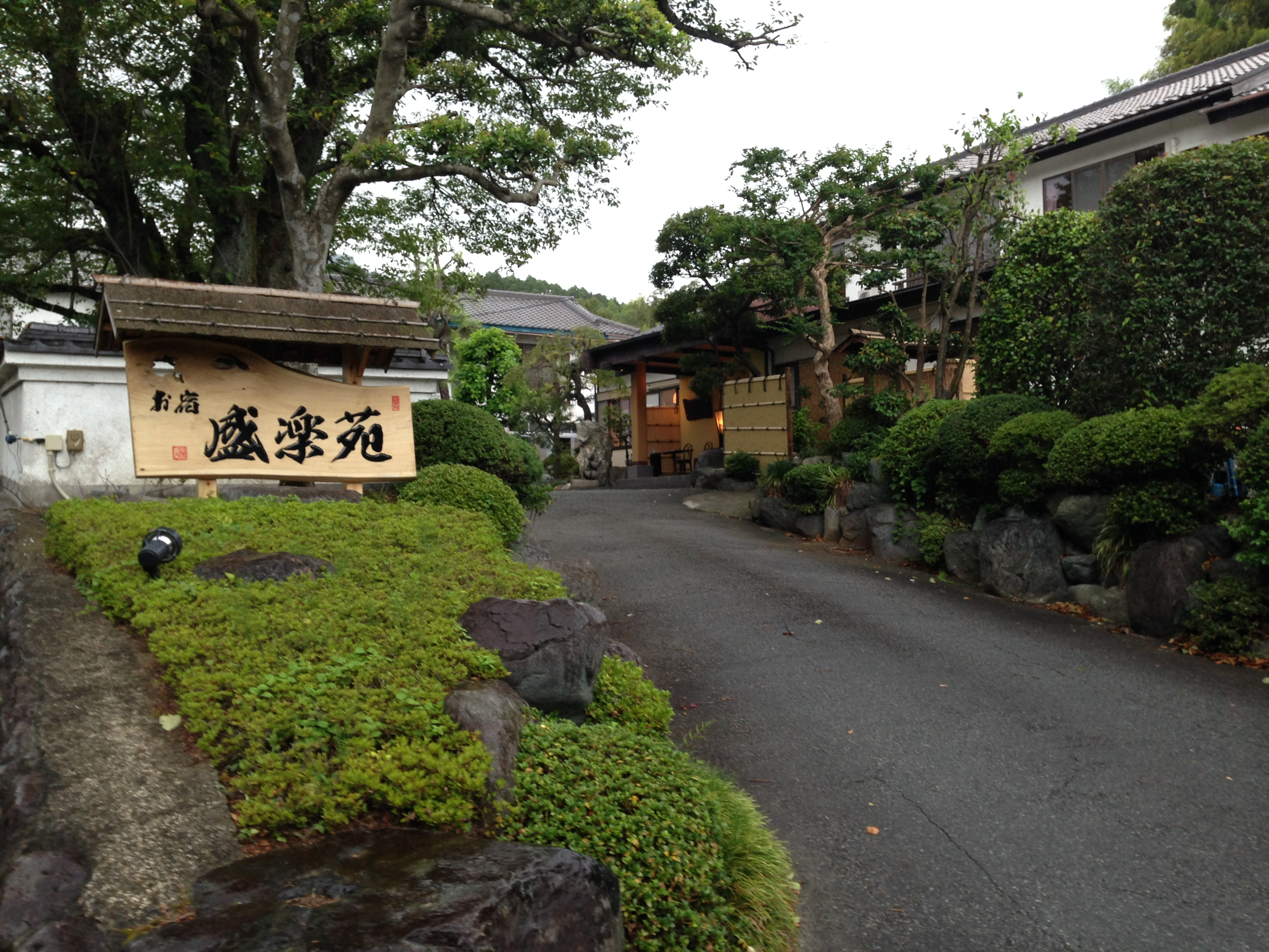 神奈川県厚木市の七沢温泉郷にある温泉旅館「盛楽苑」。